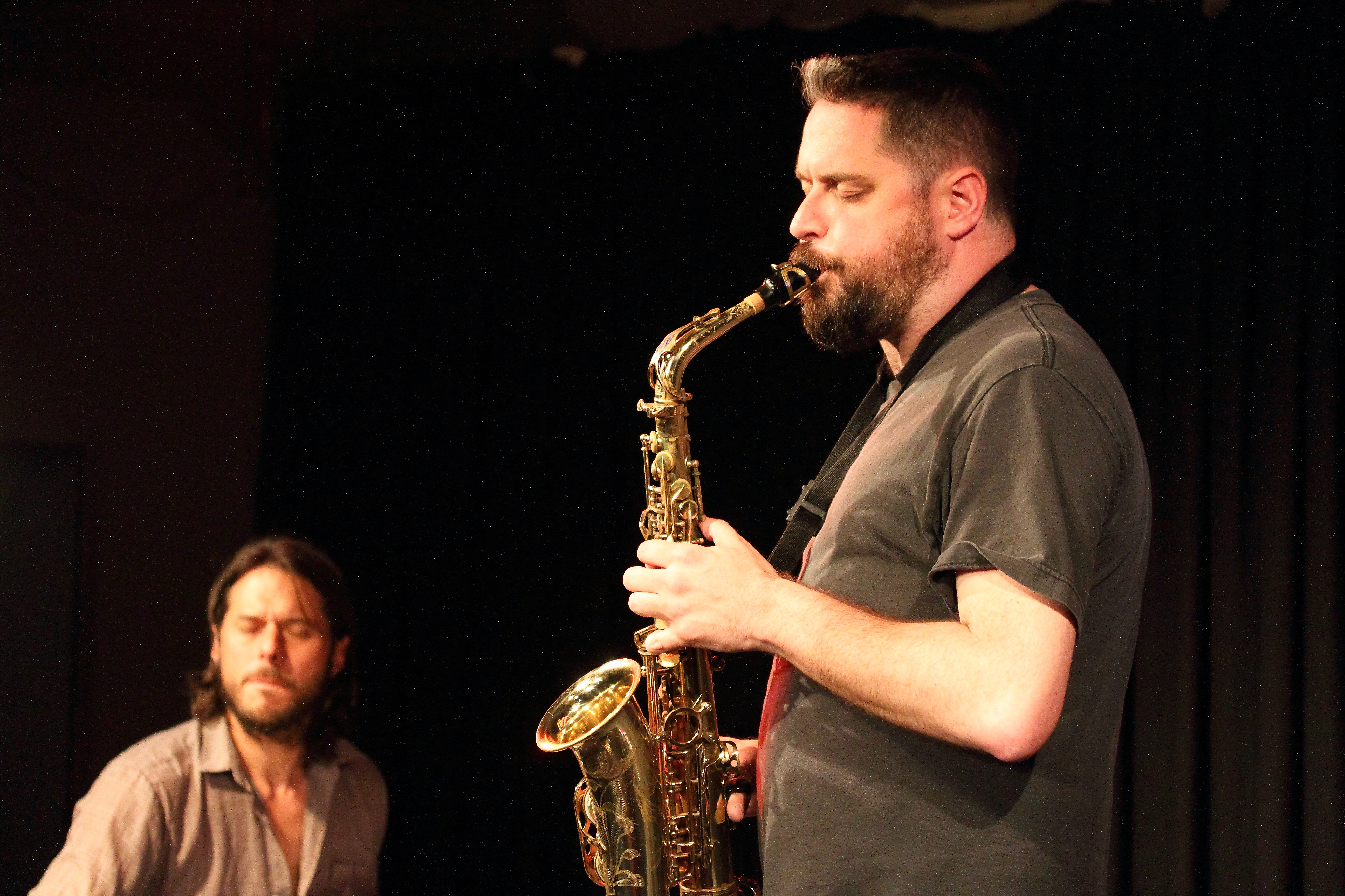 The Rempis Percussion Quartet mit Dave Rempis (sax), Ingebrigt Håker Flaten (b), Tim Daisy (dr) & Frank Rosaly (dr) im Club W71 in Weikersheim.